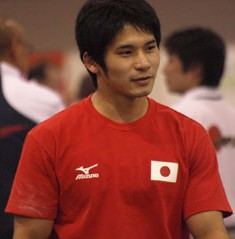 田頭 剛 2009年 アメリカ（カリフォルニア）で撮影